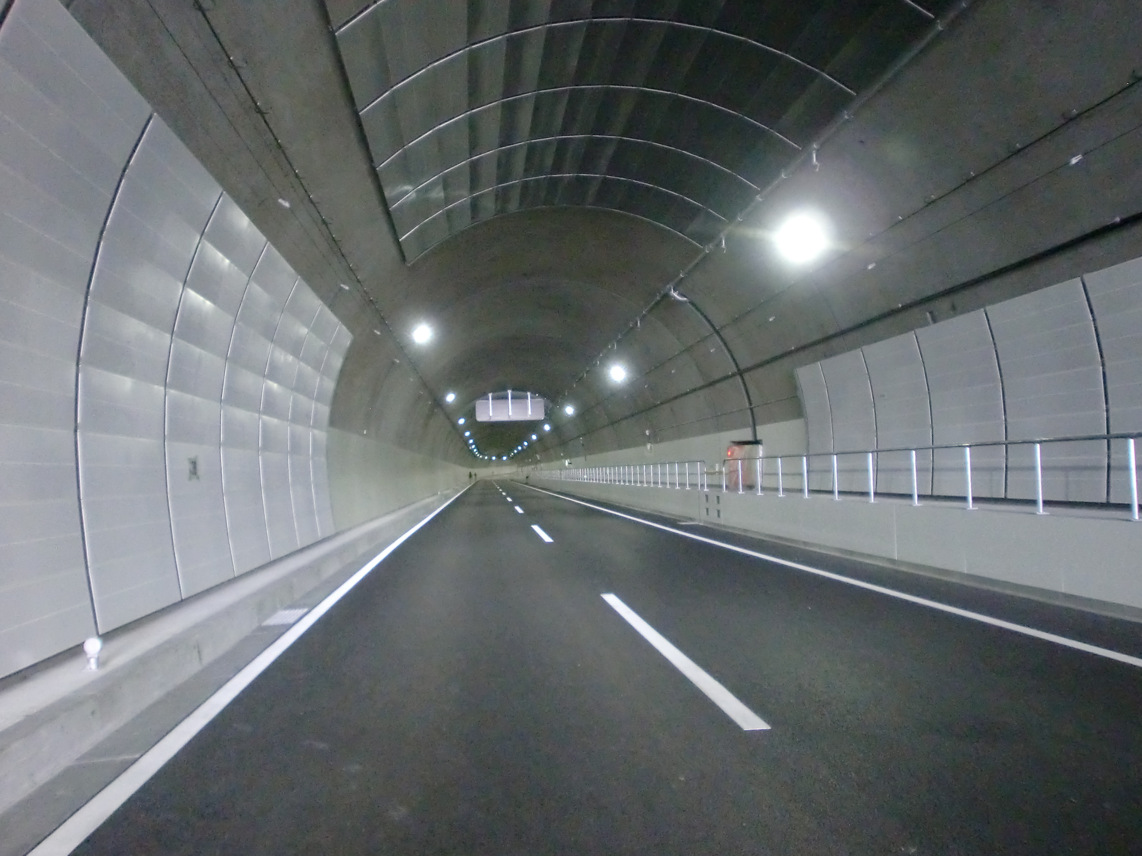 新武岡トンネルを田上IC付近から建部神社方面を望む（進行方向反対）